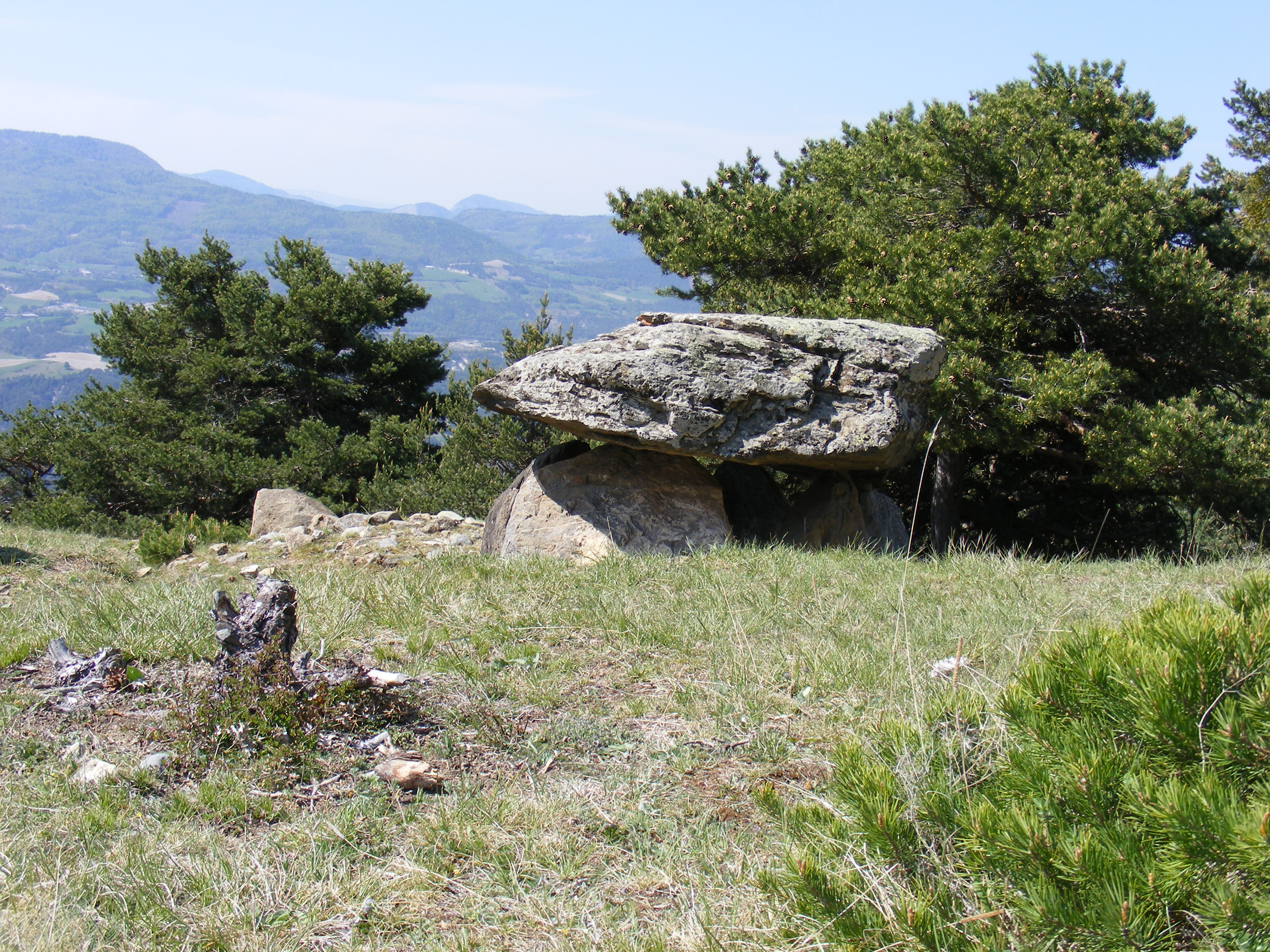 Le Dolmen est situé au nord du village noyé d´Ubaye. On ne connait pas le date de son errection. Le village de Villard, à quelques mètres eloigné, est abandonné depuis des années.Il ne reste qu´une seule maison.